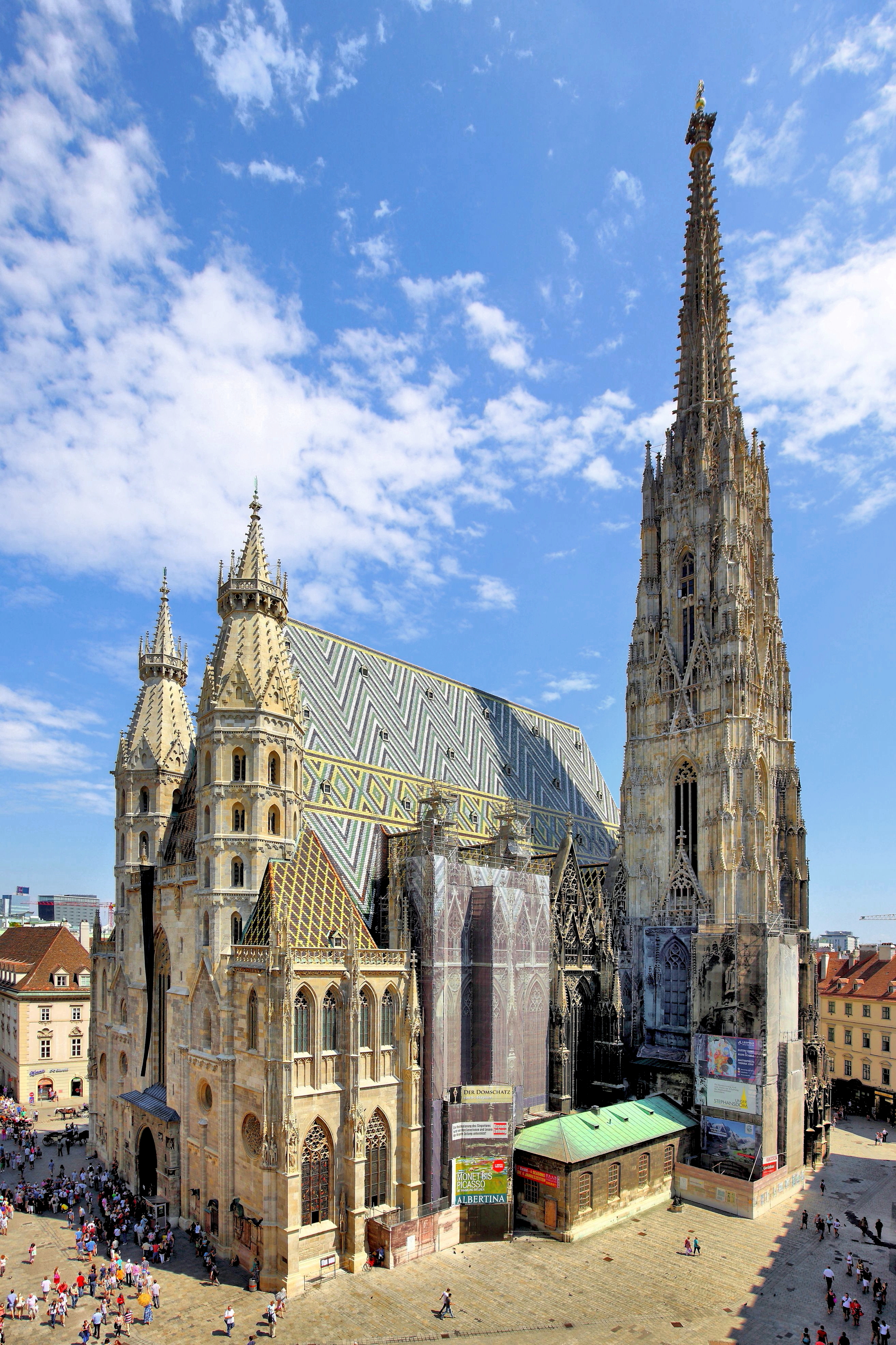 Westansicht des Stephansdoms in der österreichischen Bundeshauptstadt Wien.